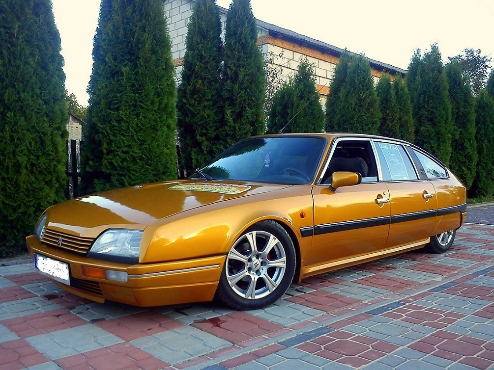 zdjęcie z 2012 roku; citroen cx 25 gti 1988r. silnik 2.5 r4 136KM, lokalizacja: Polska.